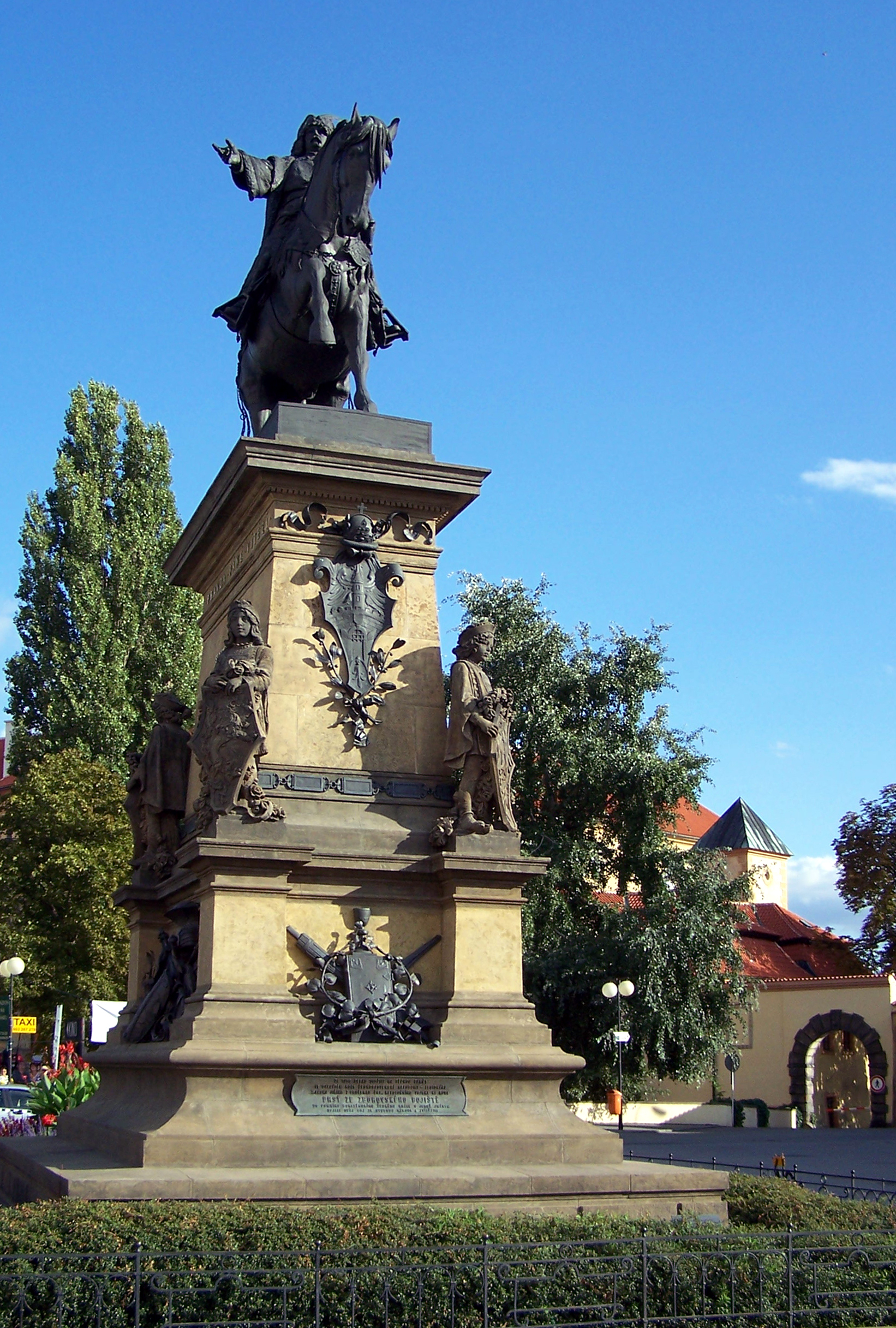 Pomník krále Jiřího od Bohuslava Schnircha, Poděbrady